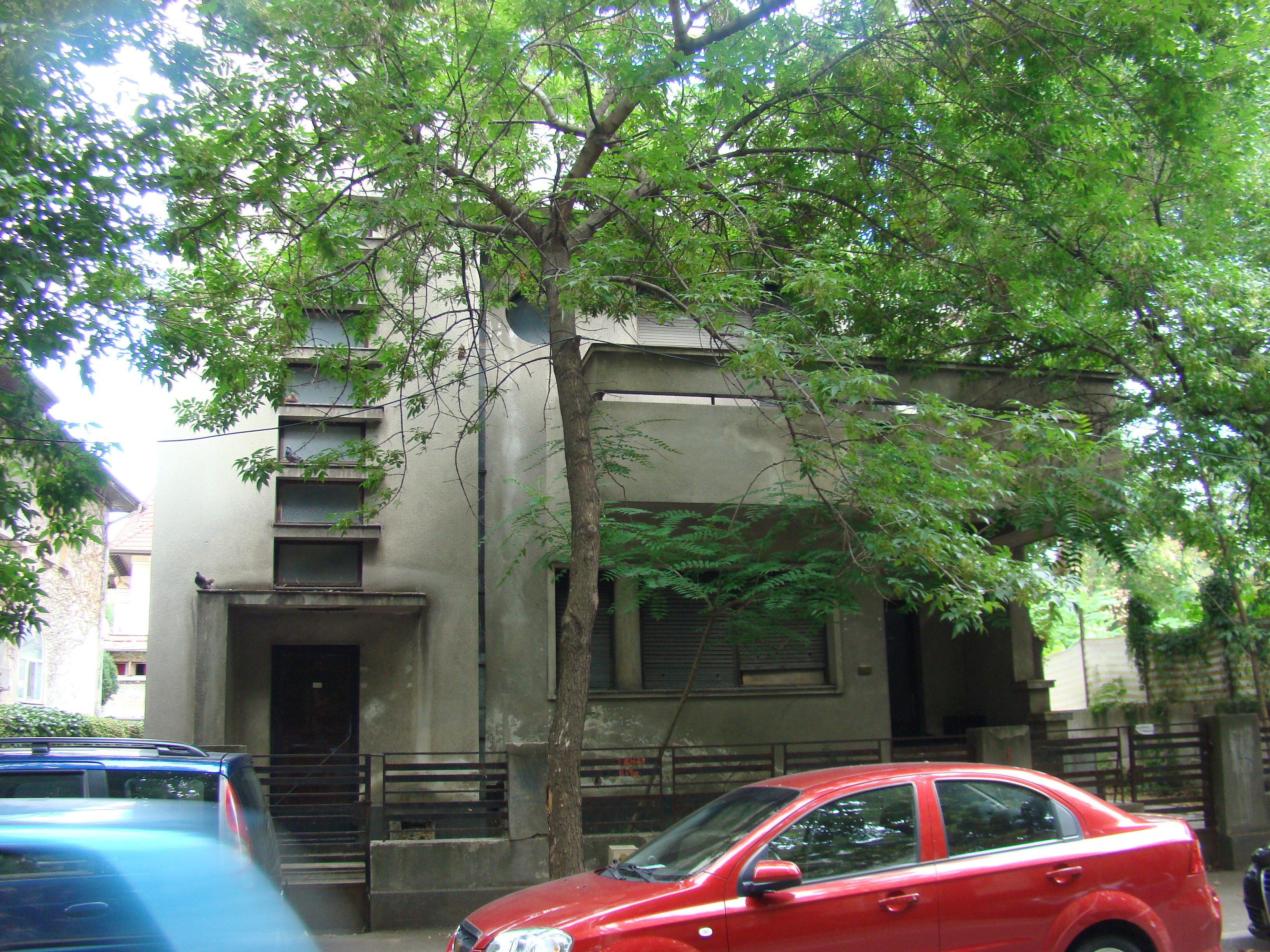 Casă monument istoric, str. Roma, nr. 48